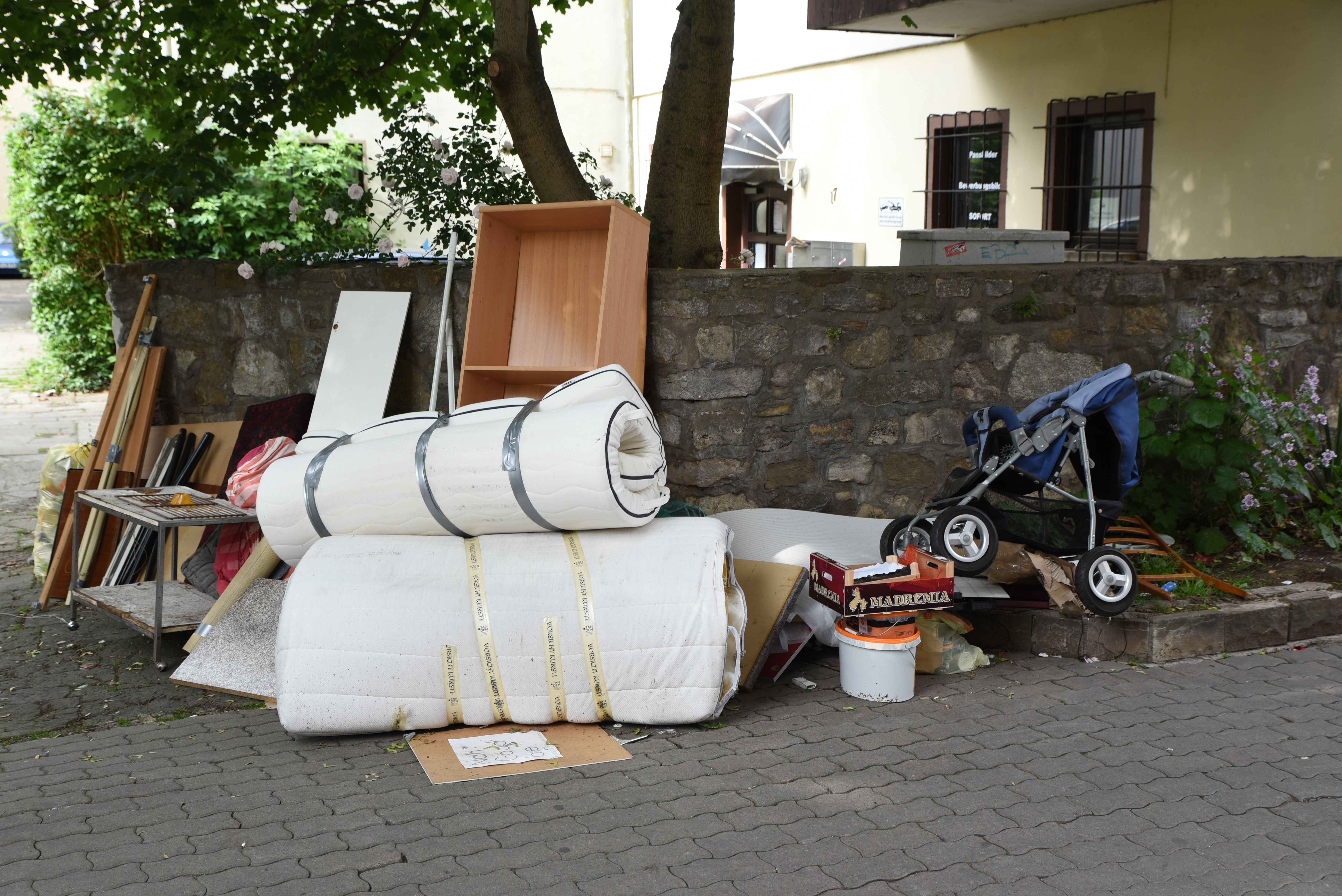 Sperrmüll in der Erfurter Altstadt, Mettengasse